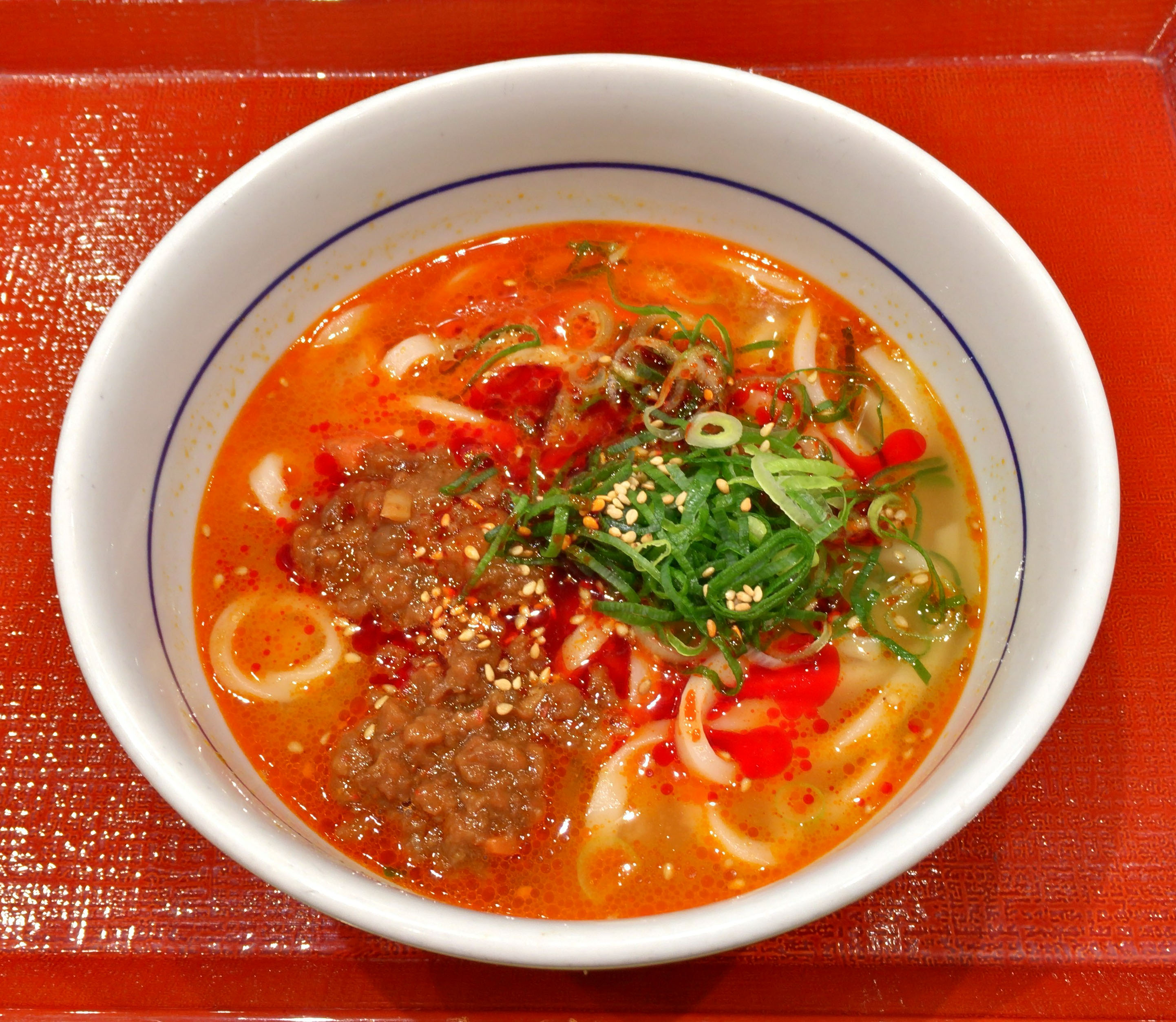 なか卯 麻辣担々うどん（530円）